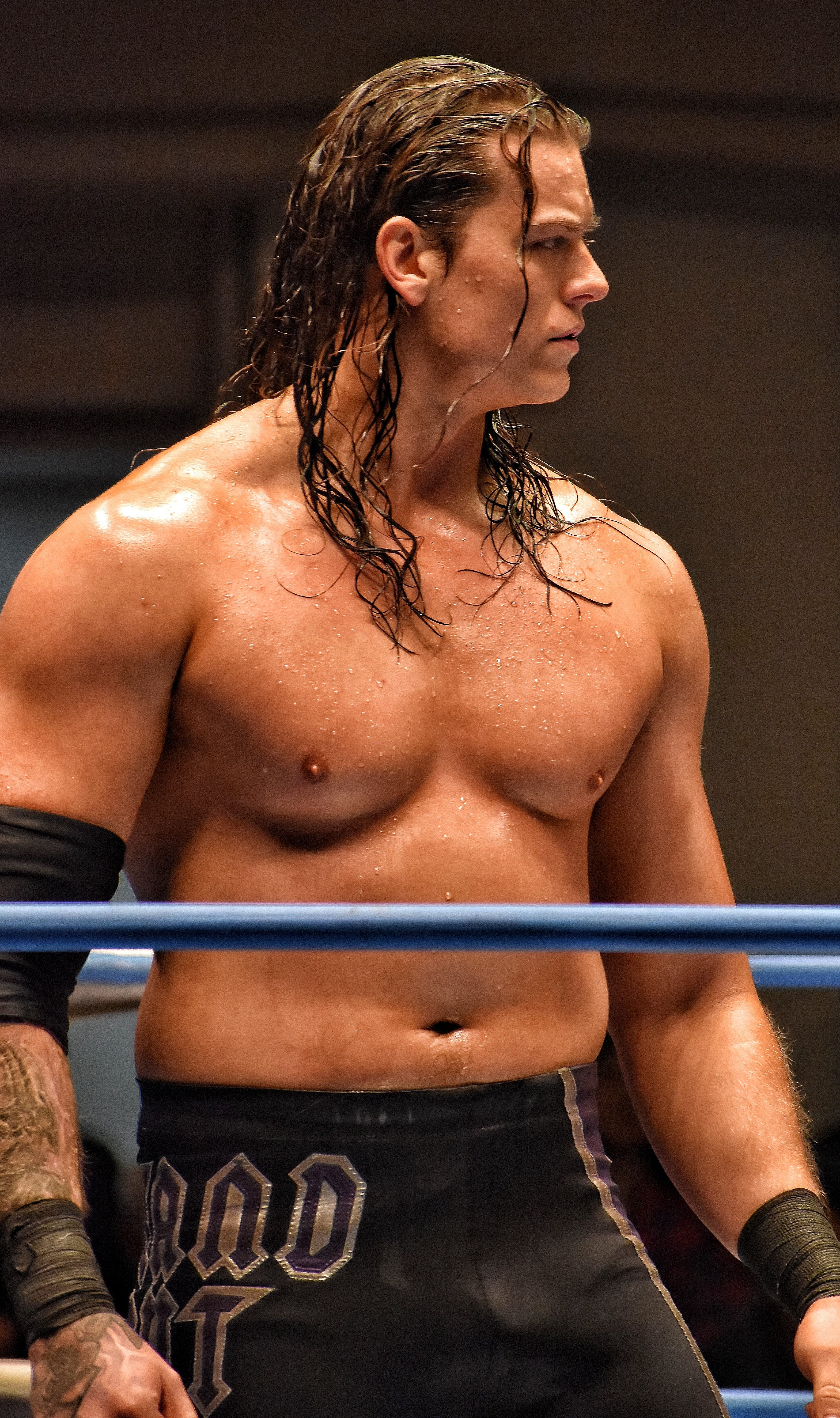 プロレスラーのルーカス・スティール